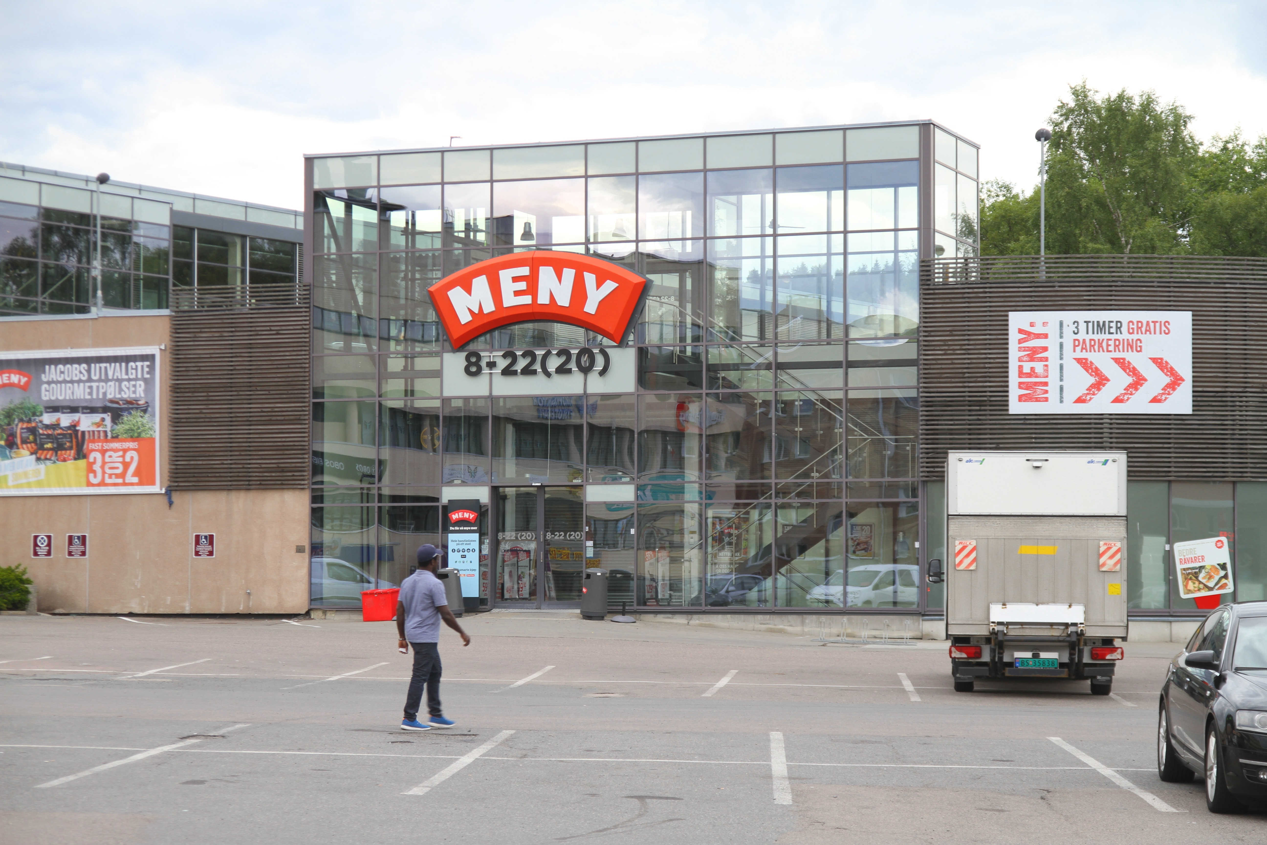 Supermarkedet Meny. Kalbakkveien 6 i Oslo.